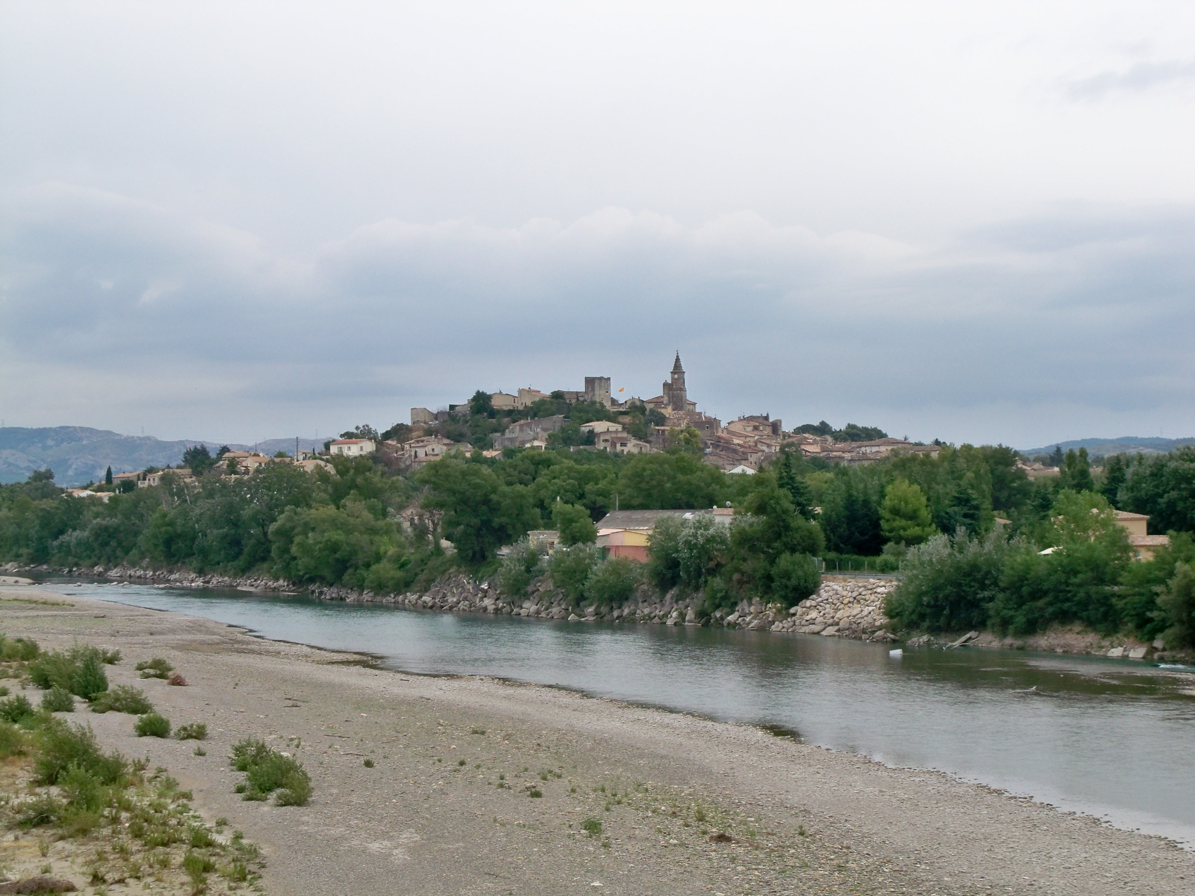 vue générale de Mallemort, Bouches-du-Rhône, France